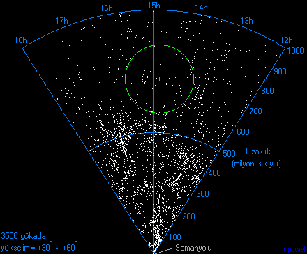 Evrenin, Çoban boşluğu'nu gösteren dilimi.